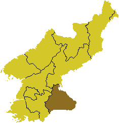 Map of Kangwong-do, DPRK, 2006